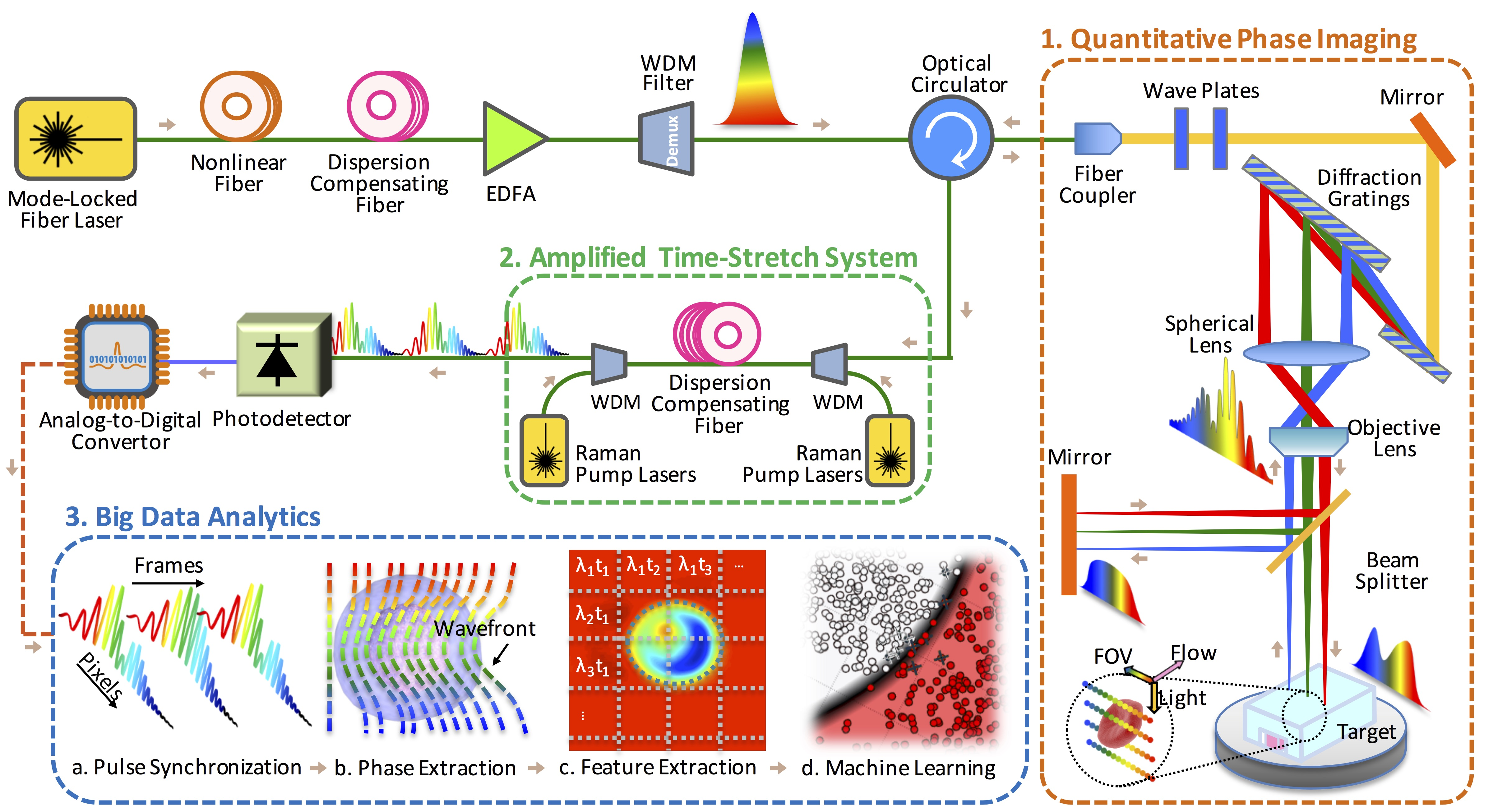 Time stretch quantitative phase imaging system is an artificial intelligence facilitated microscope that includes a big data analytics pipeline for machine vision and learning.